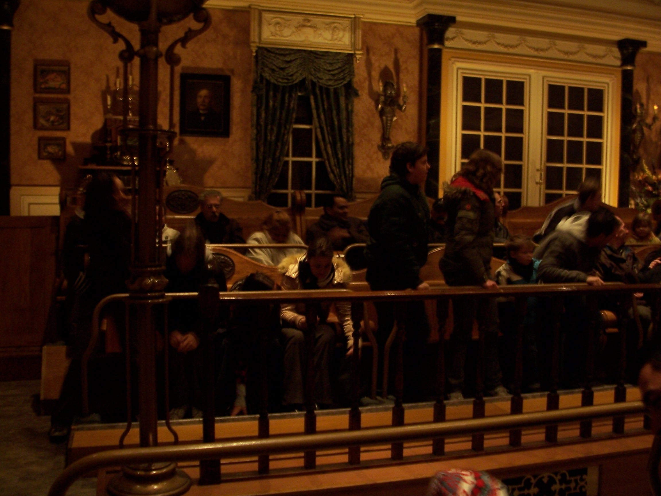 Villa Volta in Efteling